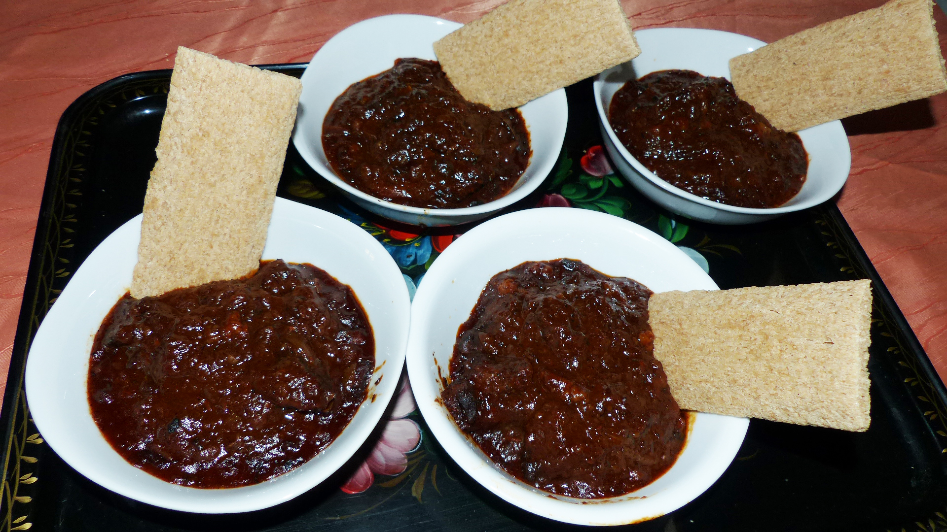 Essigfleisch, mit Pflaumen und Honig - eine jüdisch-ashkenasische Spezialität